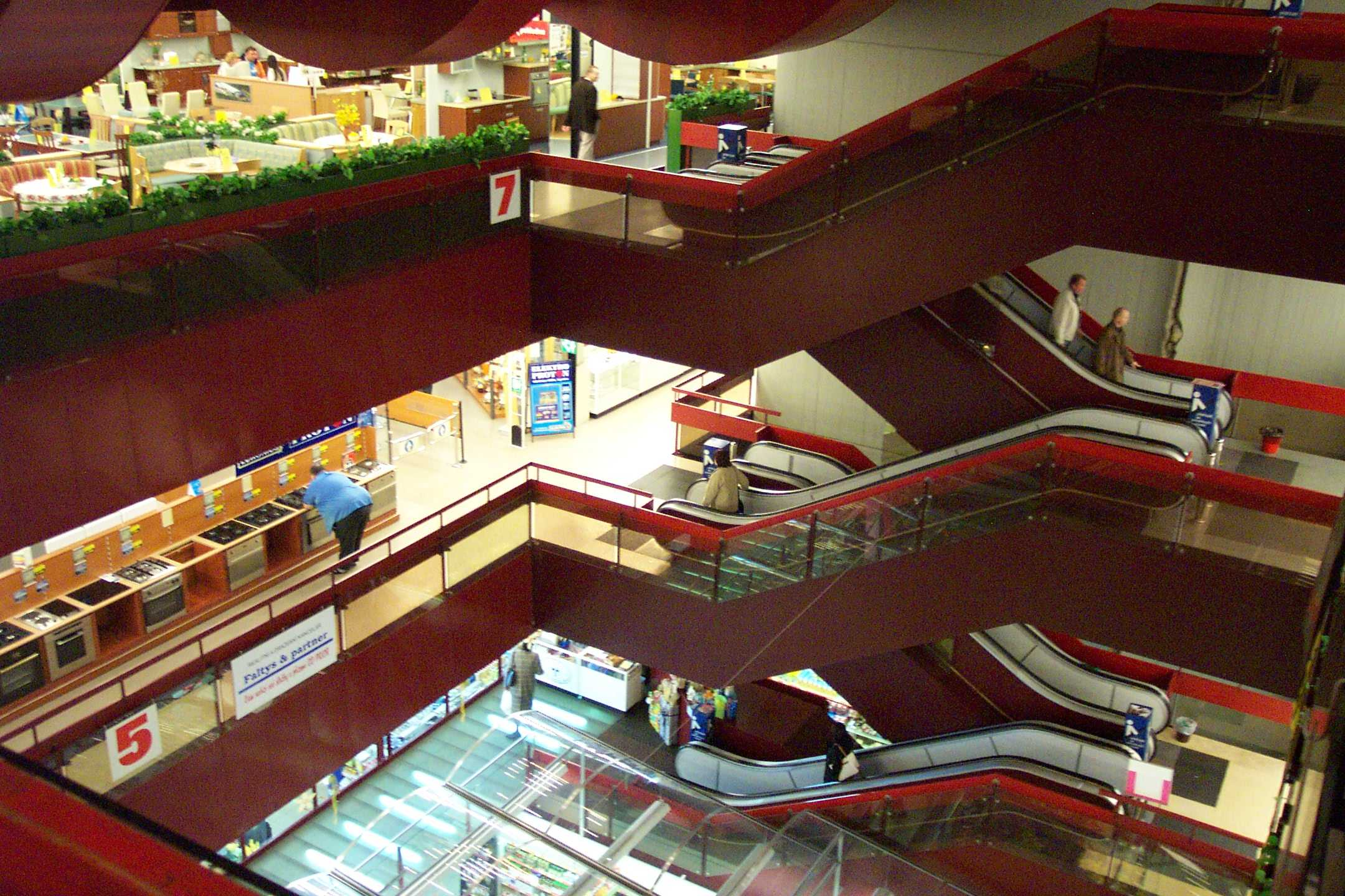 Department store Dům bytové kultury from 1981 in Prague, interieur, Budějovická - Obchodní dům Dům bytové kultury v Praze na Budějovické, interér